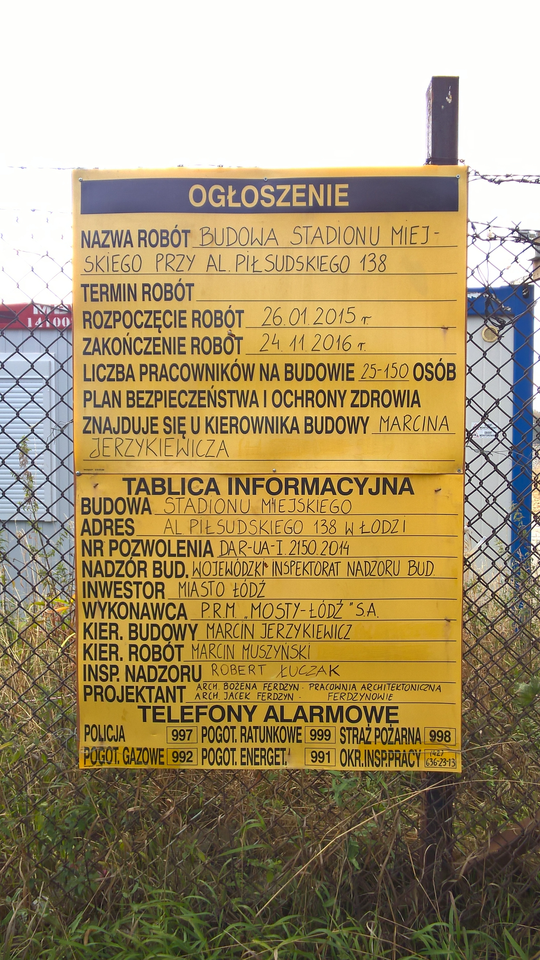 Budowa stadionu Widzewa Łódź - tablica informacyjna